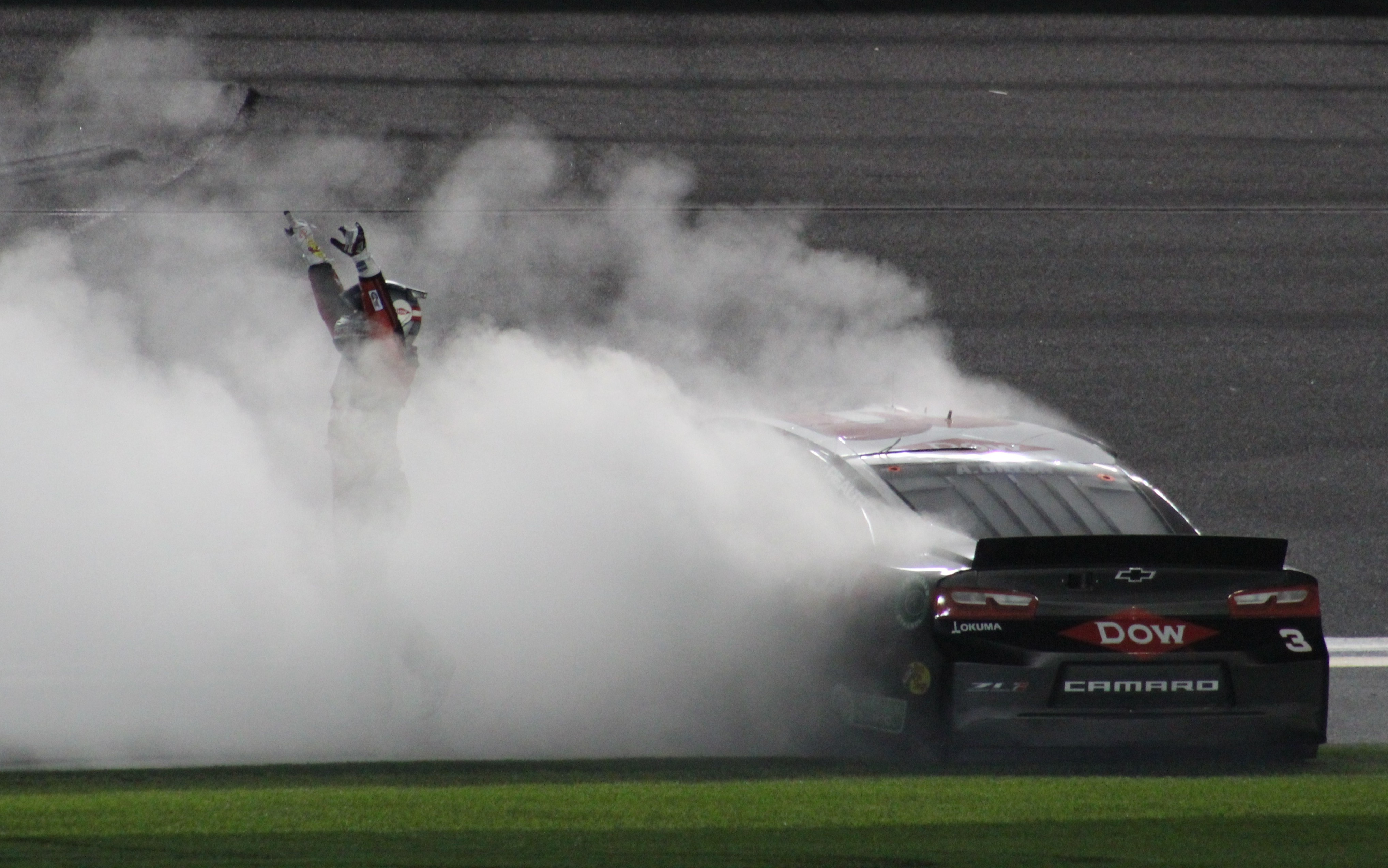 2018 Daytona 500